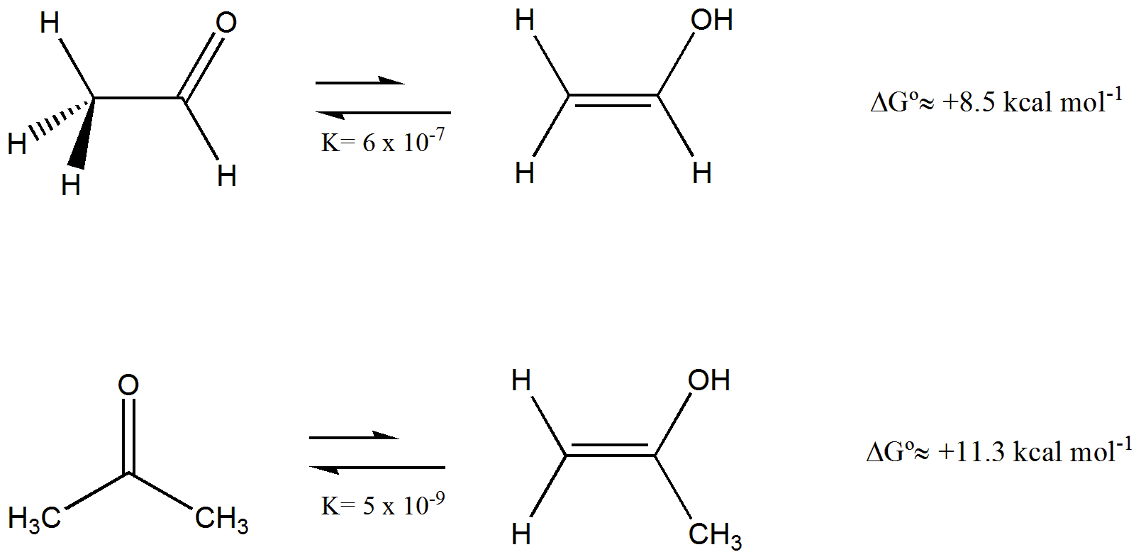 Tautomeria ceto enolica